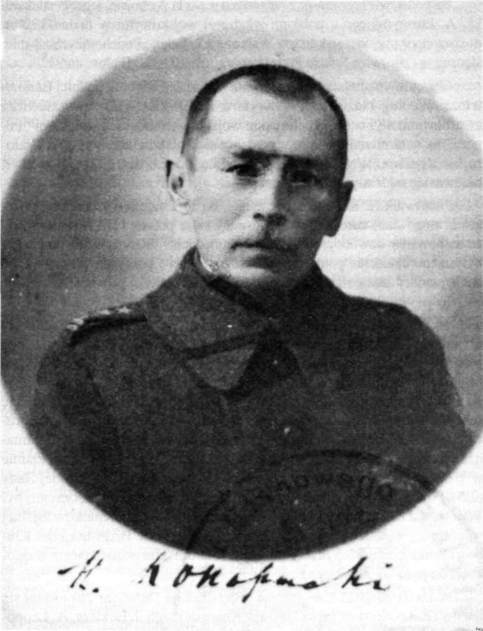 Hassan Konopacki, rosyjski, białoruski i polski wojskowy i polityk.